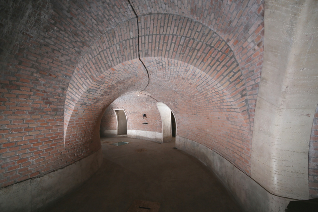 Bunker Villa Ada Savoia. L'area dedicata al ricovero delle autovetture